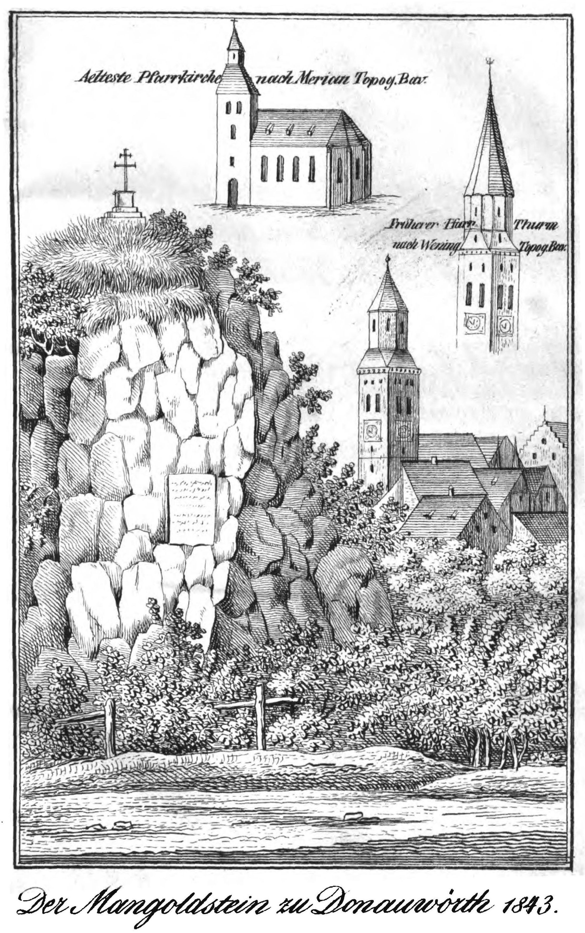 Der Mangoldstein beim Kloster zum heiligen Kreuz in Donauwörth.